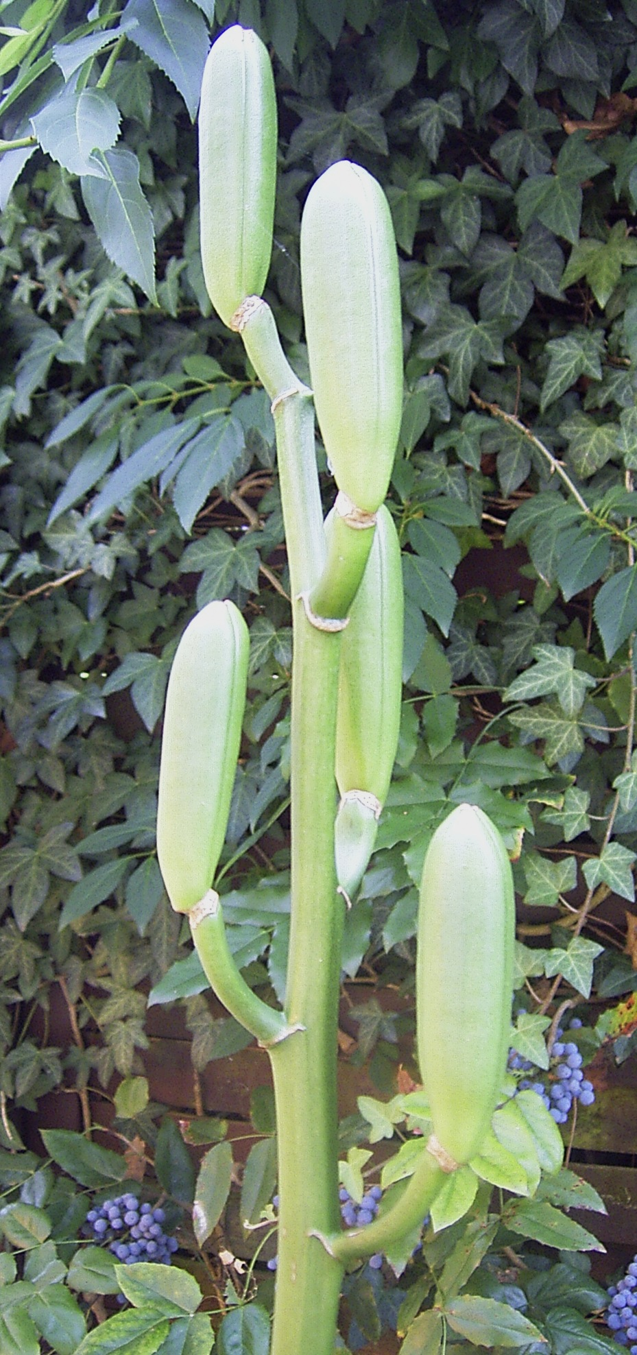 Cardiocrinum giganteum, Capsula